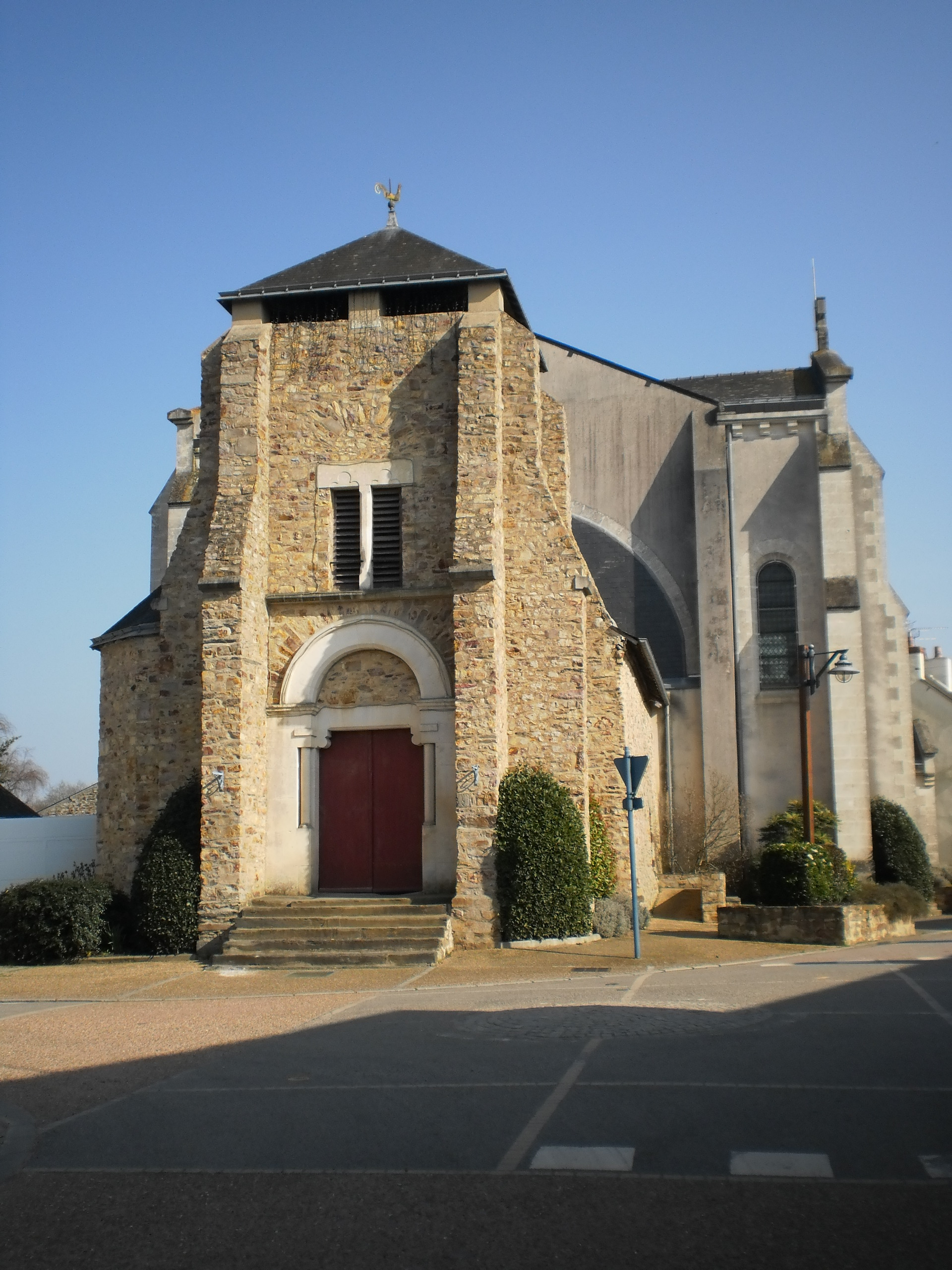 Ruffigné (Loire-Atlantique, France) - église, côté ouest